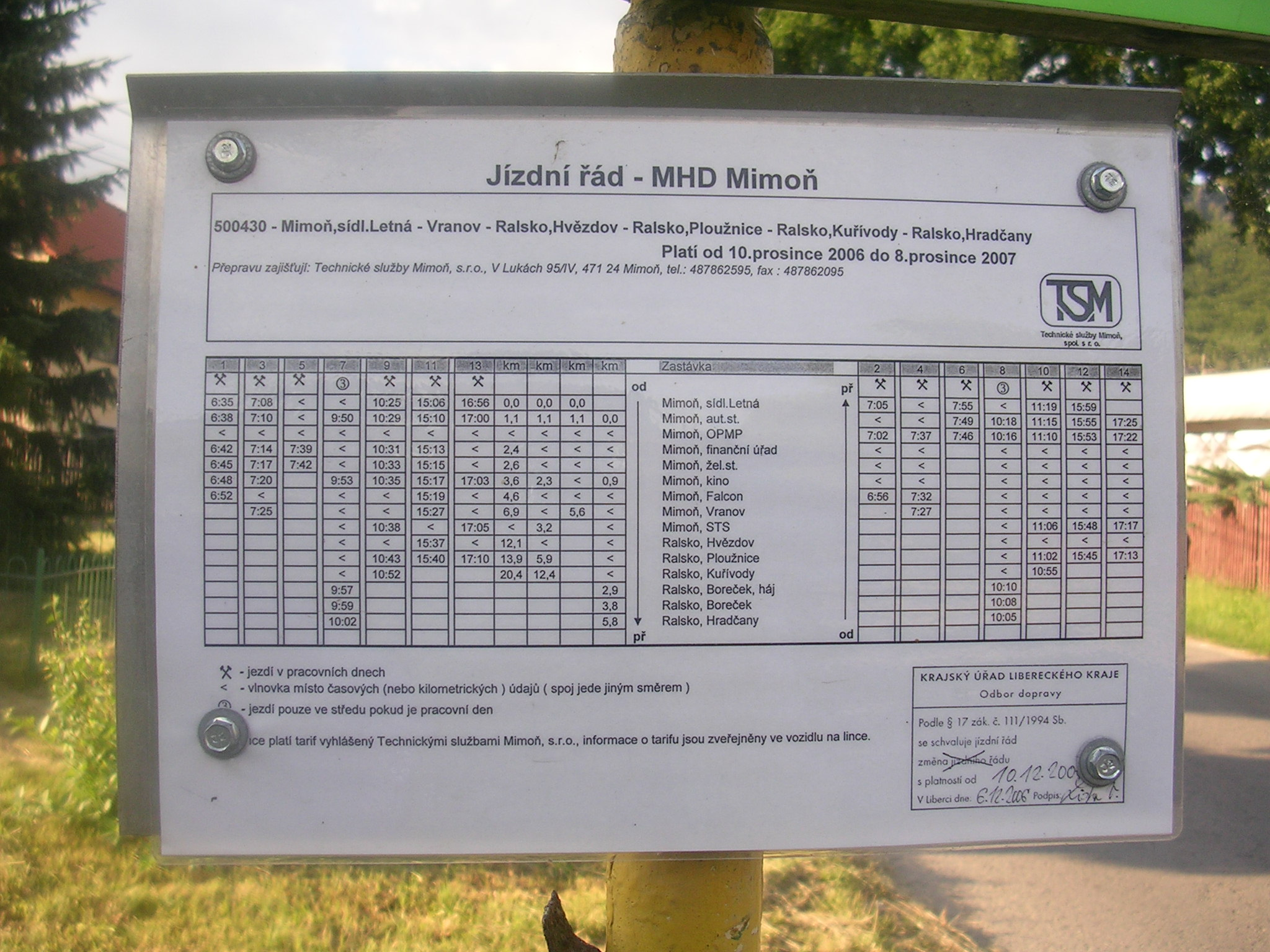 Jízdní řád městské autobusové linky v Mimoni na zastávce „Mimoň, Vranov“ - OpenStreetMap (Info)